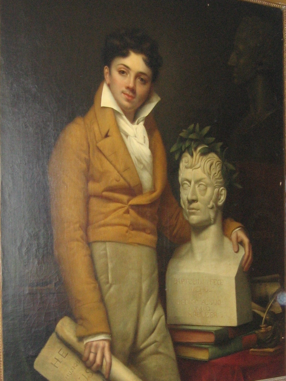 Portrait de Gustave Dugazon (1782-1826)